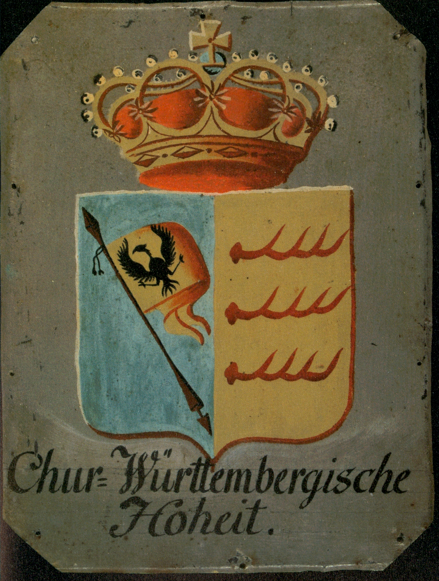 Württembergische Hoheitstafel mit Herzschild des kurfürstlichen Wappens (1803–1806) bestehend aus Grüninger Reichssturmfahne im heraldisch ersten und württembergischen Hirschstangen im zweiten Feld. Öl auf Eisenblech